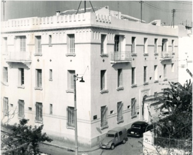 Die Stiftung für die Freiheit nahm ihre Auslandsarbeit in Tunis auf.